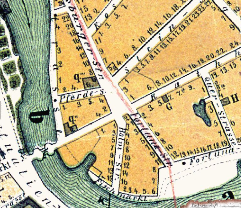 Tartu 1877. aasta kaart, välja lõigatud Ülejõe osa. Kivisild, Raatuse, Hobuse, Kivi, Holmi, Fortuuna, Henningi plats.